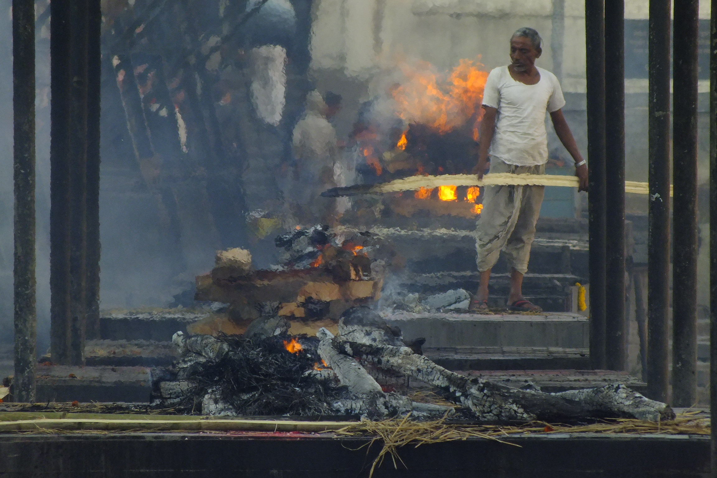 Bagmati River, Pashupatinath, Nepal バグマティ川とパシュパティナート火葬場